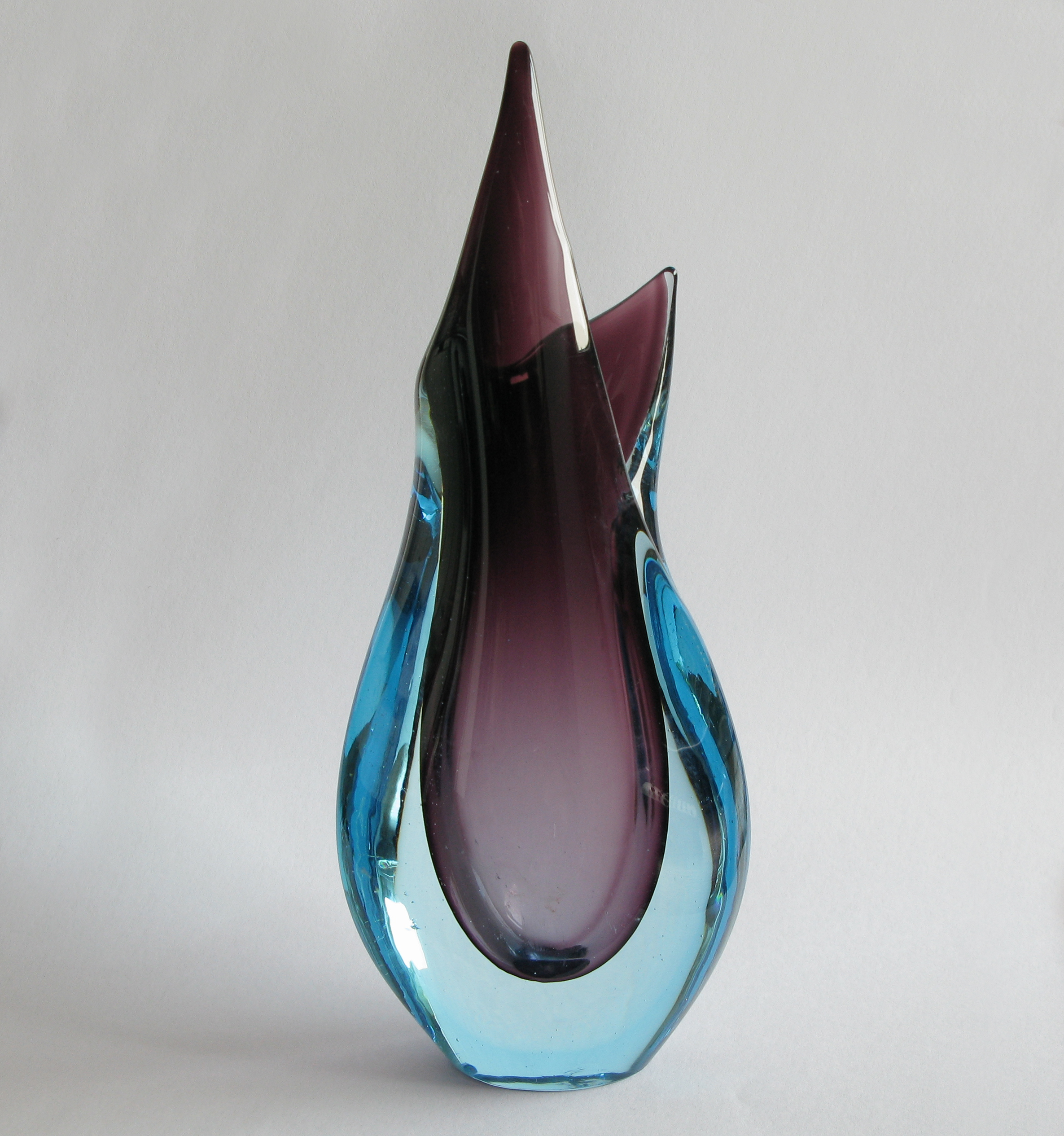 Zipfel- bzw. Trofenvase, Seguso Vetri d'Arte, Entwurf Flavio Poli